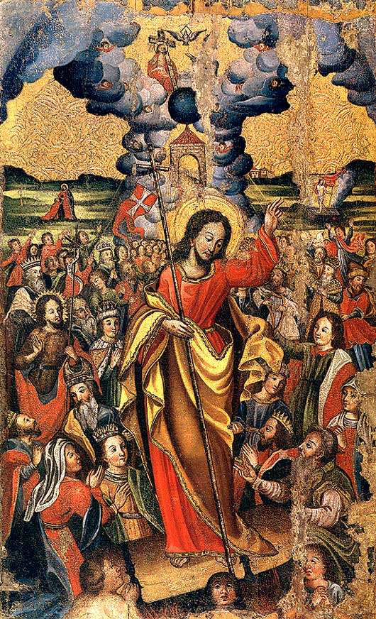 Сашэсце ў Пекла. Апошняя чвэрць 17 - пачатак 18 ст. Фрагмент. Дошка, яечная тэмпера. 143х95х3.